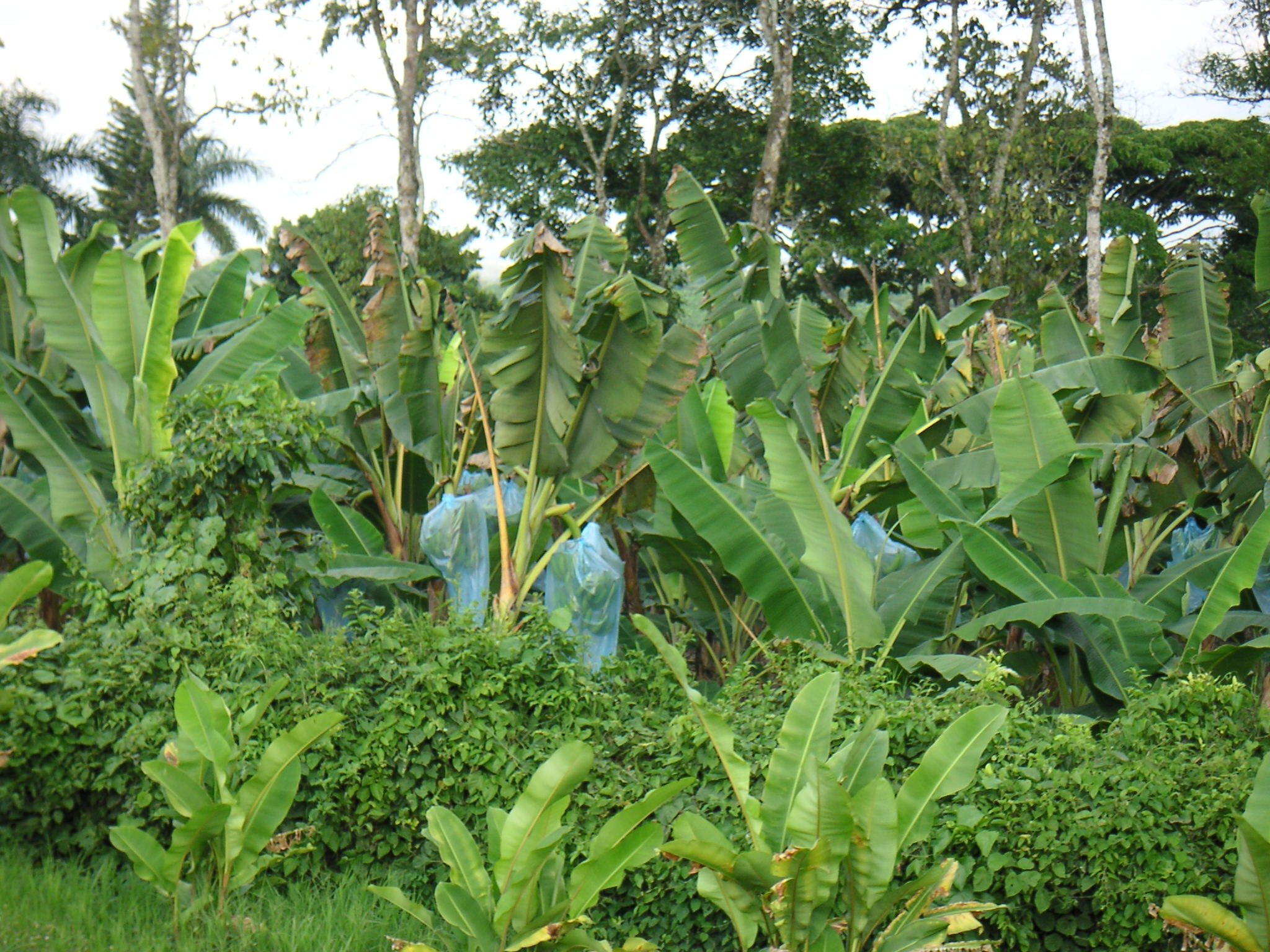 Bananenpflanzen bei Armenia / Kolumbien